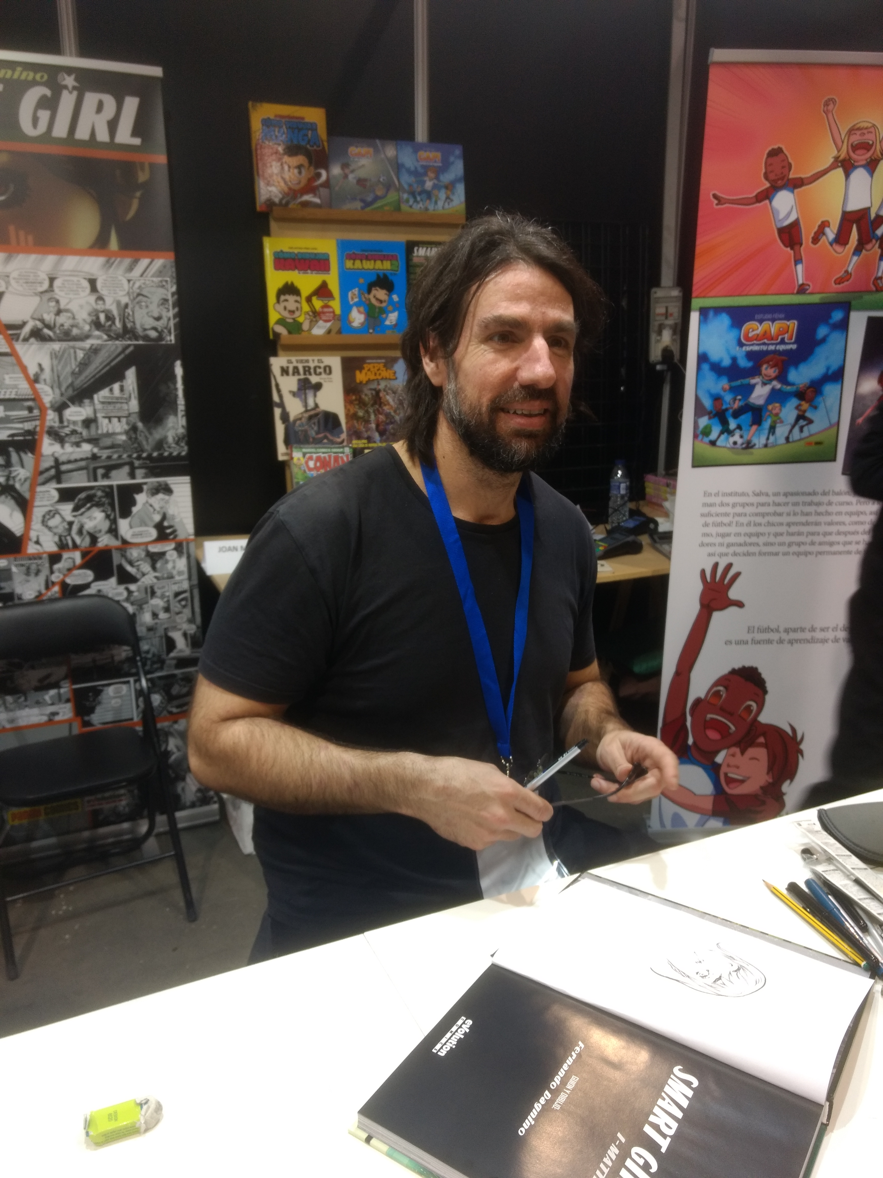 Fernando Dagnino al Saló del Còmic de València